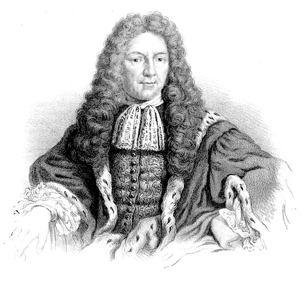 Bengt Gabrielsson Oxenstierna (1623-1702)